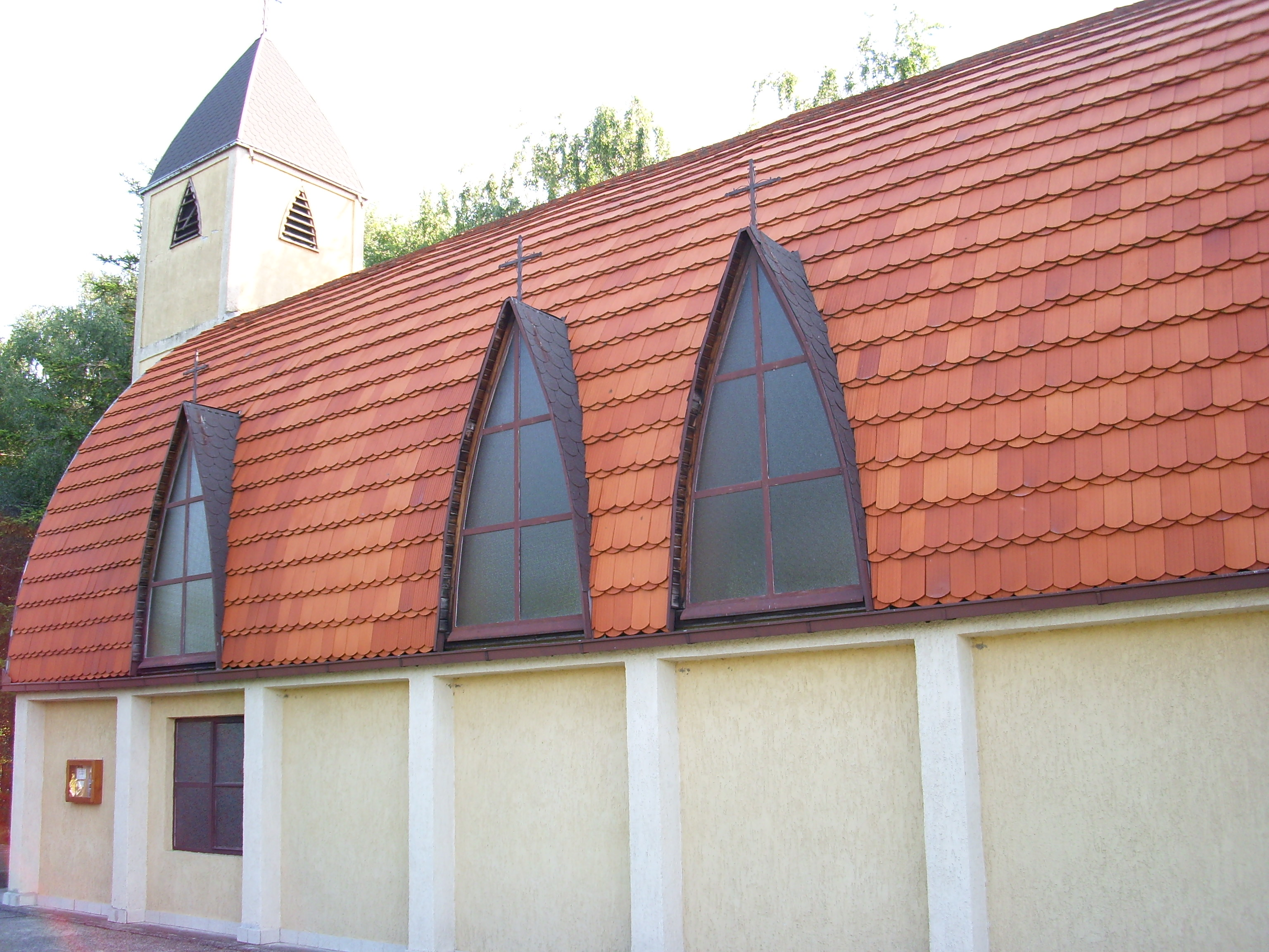 Nagybodaki katolikus templom oldalról